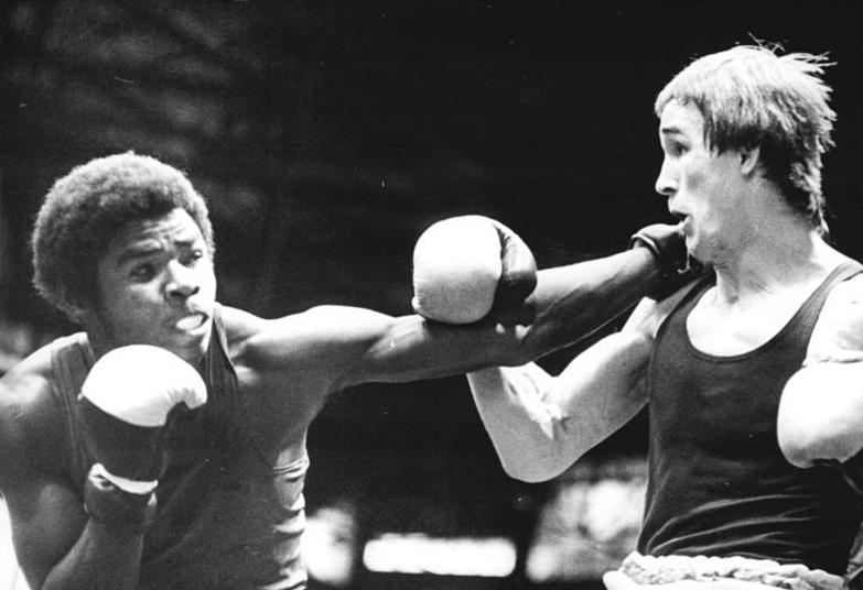 Bernardo Comas, Manfred Trauten ADN-ZB Lehmann 20.3.81 Halle-X. Internationales Boxturnier um den Chemiepokal- Den besten Kampf am Nachmittag lieferten sich im Mittelgewicht Vorjahressieger Manfred Trauten (r.) und der Kubander Bernardo Comas. Trauten siegte nach Punkten und zog damit ins Finale ein.